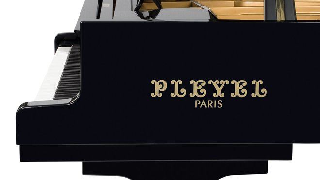 Logo + piano Pleyel de concert noir laqué